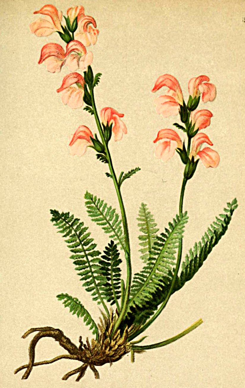 Pedicularis incarnata (Pedicularis rostratospicata)